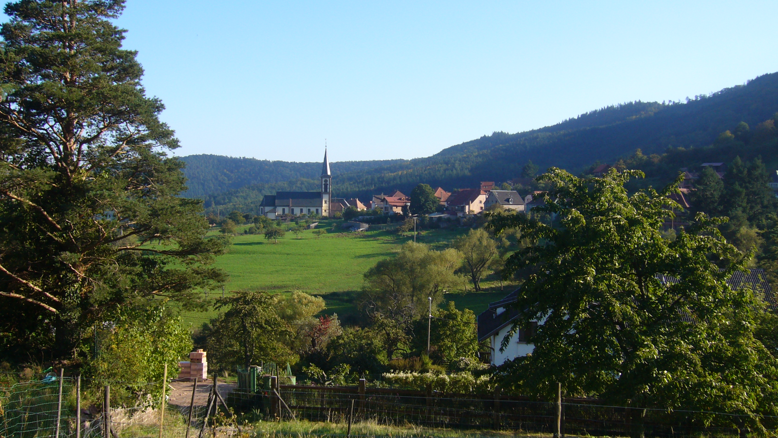 Vue sur le village de Thannenkirch